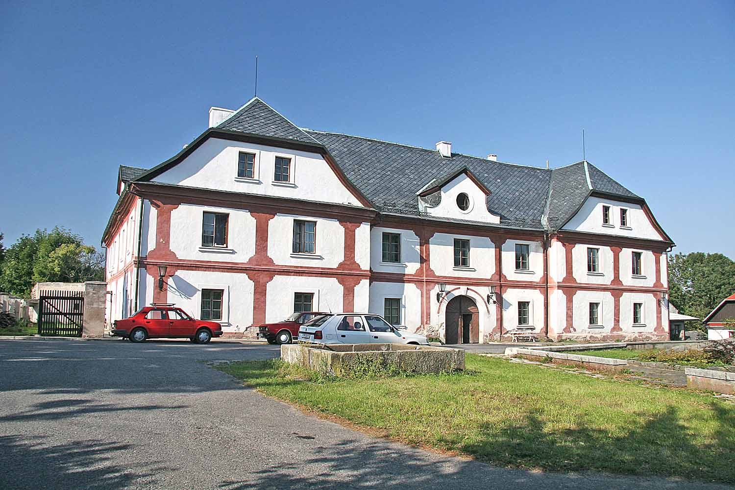 Budova Panského dvora v obci Předhradí, Chrudim district, Czech Republic autor: Prazak Date: 14. 9. 2006